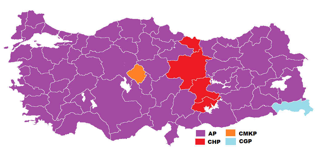 1969 genel seçimleri sonuçlarının Türkiye haritasında gösterimi.